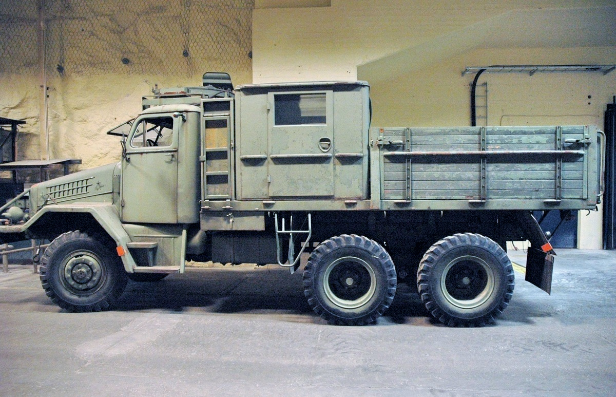 Scania-Vabis, Lastterrängbil 957 F eller Ltgbil 957 F (M5150-957011) prototyp. Den sk "urmyrsloken" med en rak 8-cylindrig sugdiesel. Milregnr: 68780. Fordonet tillverkades i början av 1960-talet. Fordonet tillfördes bland annat till artilleriet som dragfordon till 15,5 cm haubits F, där den ersatte ltgb 934 som överfördes till luftvärnet.